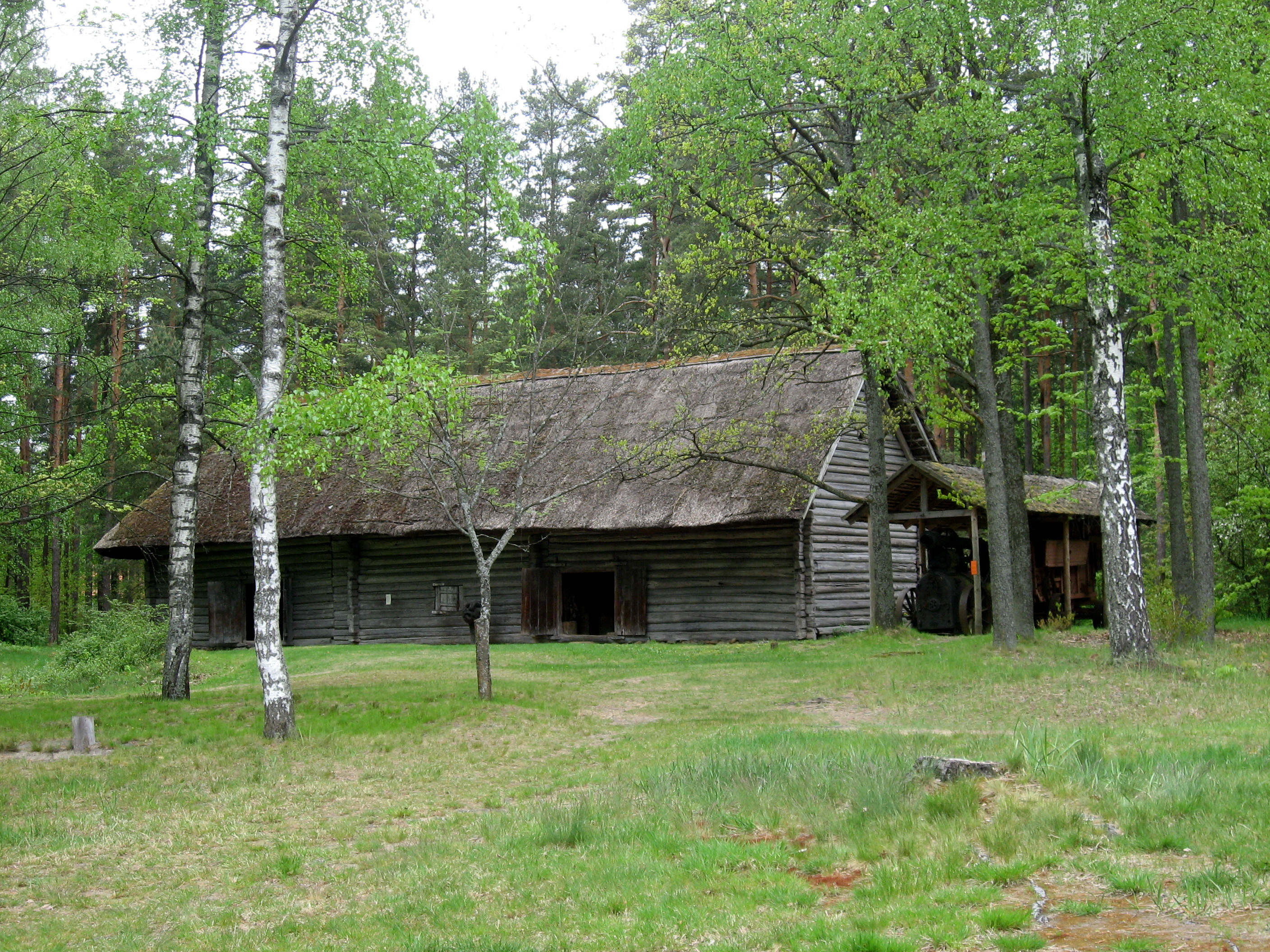 Lotyšské etnografické muzeum v přírodě: Mlátička, oblast Zemgale, Džūkste, "Ļūpīši", postavena okolo roku 1750